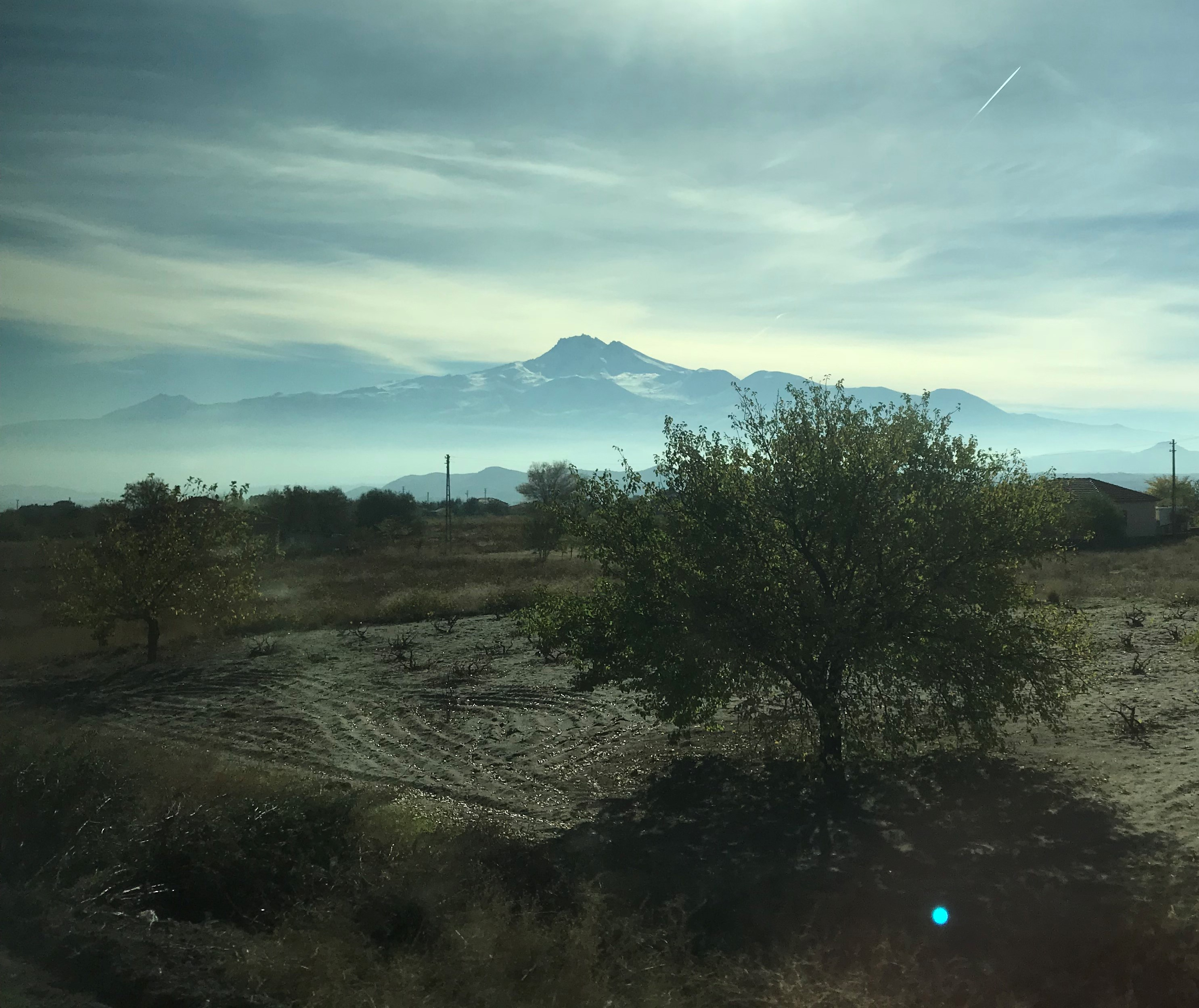 Düz bir vadiye bakarken yükselen Erciyes Dağını görüyoruz ve Güneşin ışığı ile bulutların arasından kendini belli ediyor.